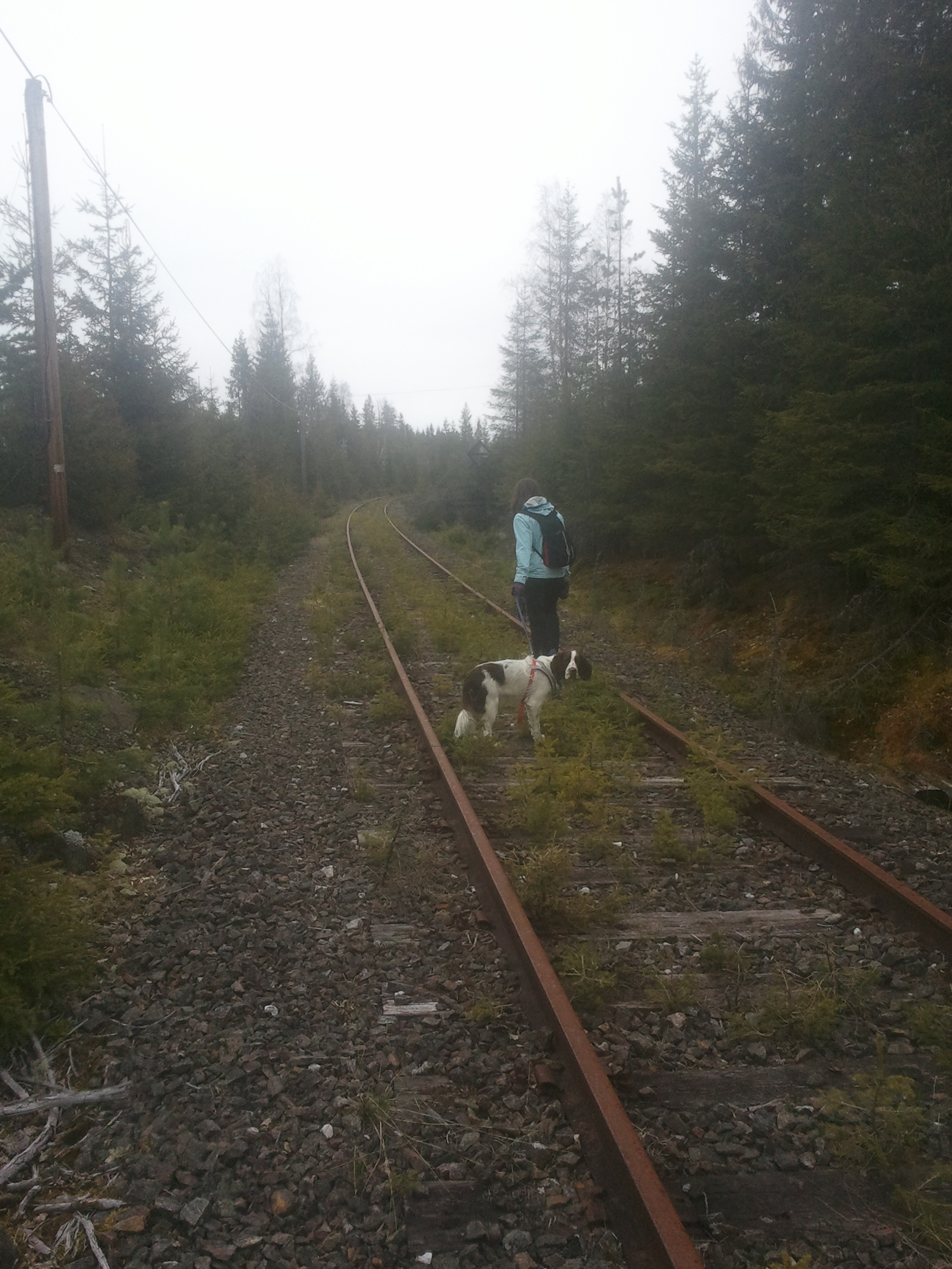 Valdresbanen ved Røste, mai 2015